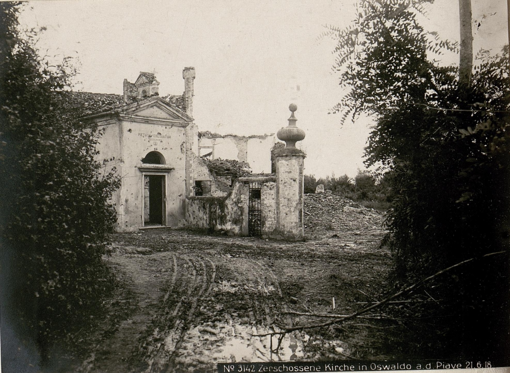 Zerschossene Kirche in Oswaldo a.d.Piave 21.6.18.